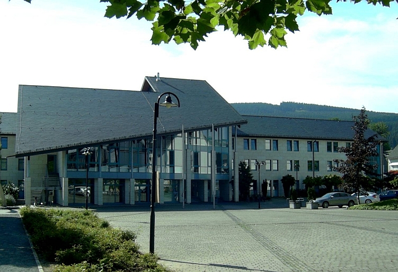 Bestwig, Rathaus, Germany.